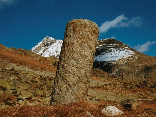 Romeinse zuil op de julierpas